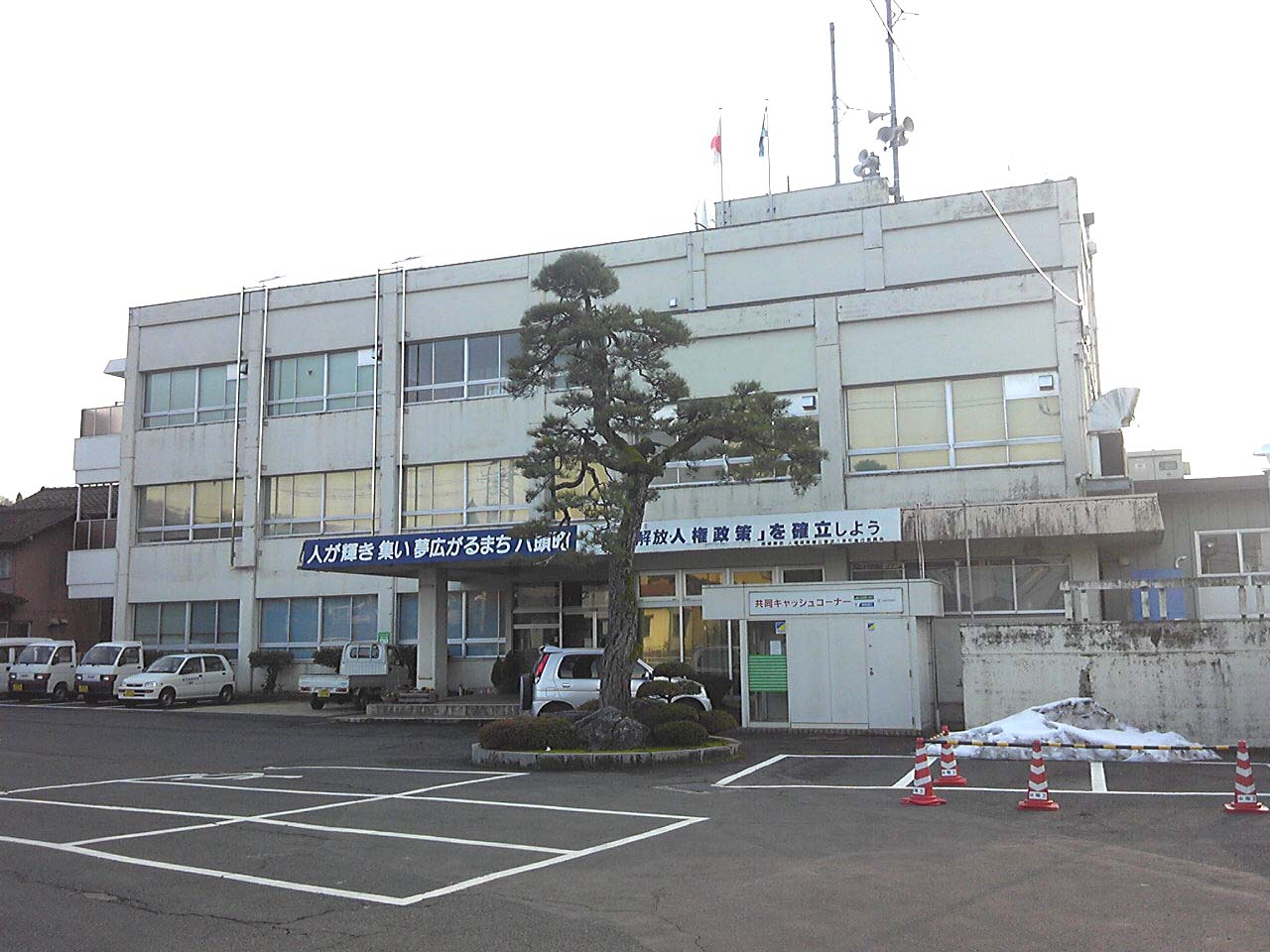 八頭町:八頭町役場